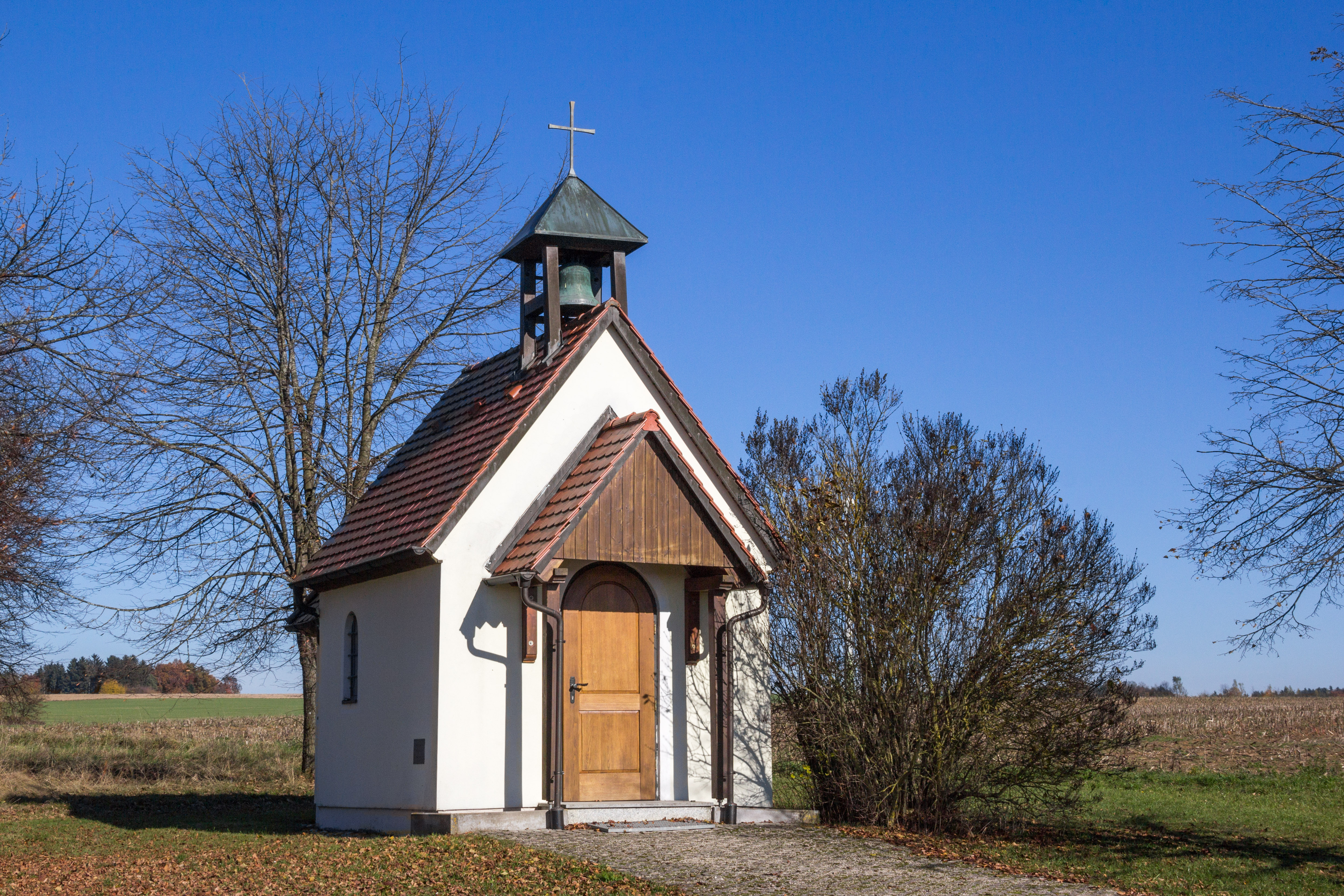 Marienkapelle, Häuselstein, Berg i. d. Oberpfalz